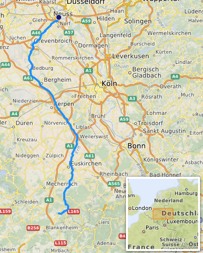 carte réalisée sur umap [1] This map may be incomplete, and may contain errors. Don't rely solely on it for navigation.